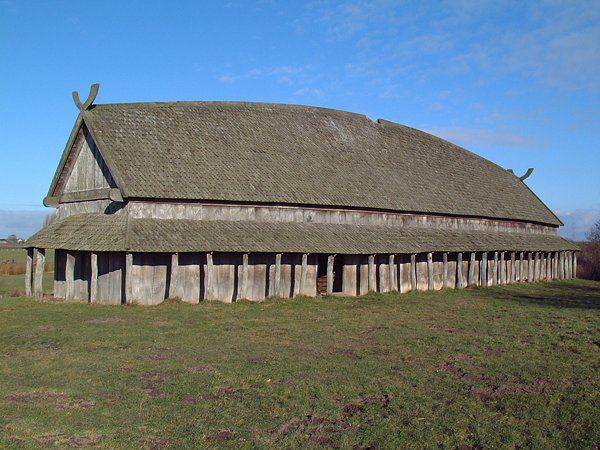 Nachbau eines Langhauses aus der Trelleborg bei Slagelse. Das Aussehen des Hauses stellt die wahrscheinlichste Möglichkeit dar; gefunden wurden nur Bodenfundamente.